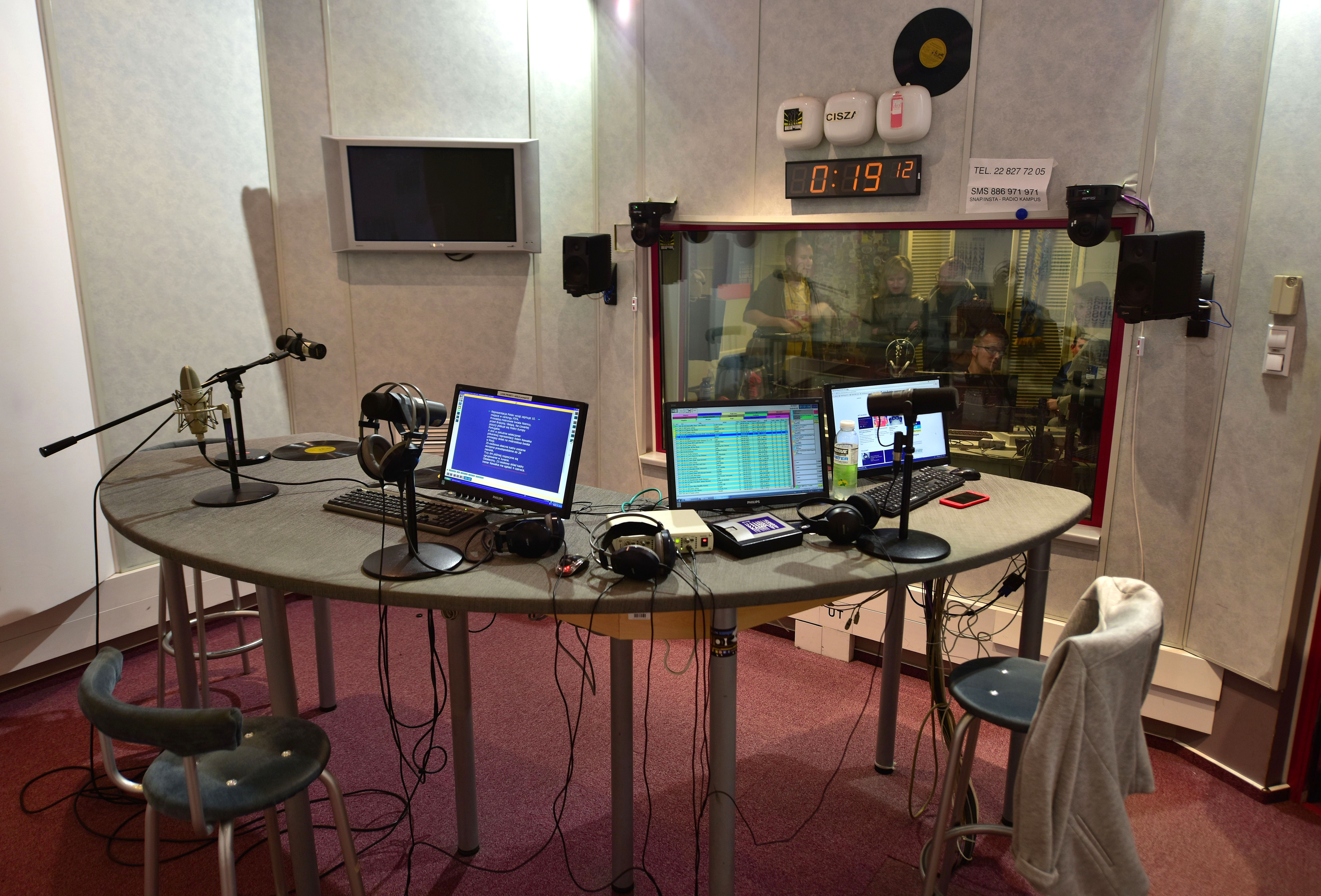 Akademickie Radio Kampus w Warszawie. Studio główne